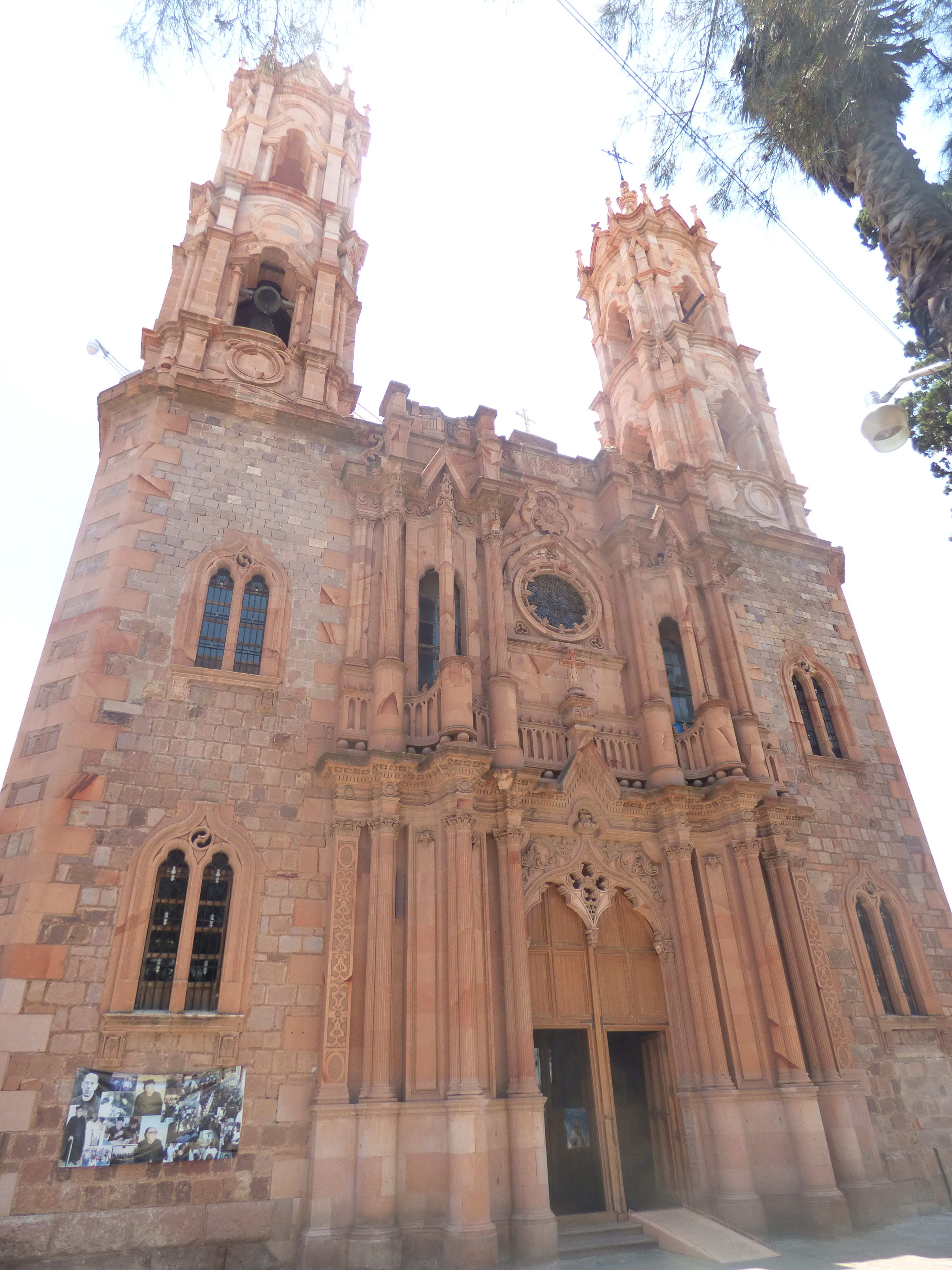 Santuario Diocesano de Ntra. Señora de Guadalupe (Guadalupito), ubicado en Zacatecas, Zac. El proyecto corrió a cargo de Refugio Reyes Rivas.